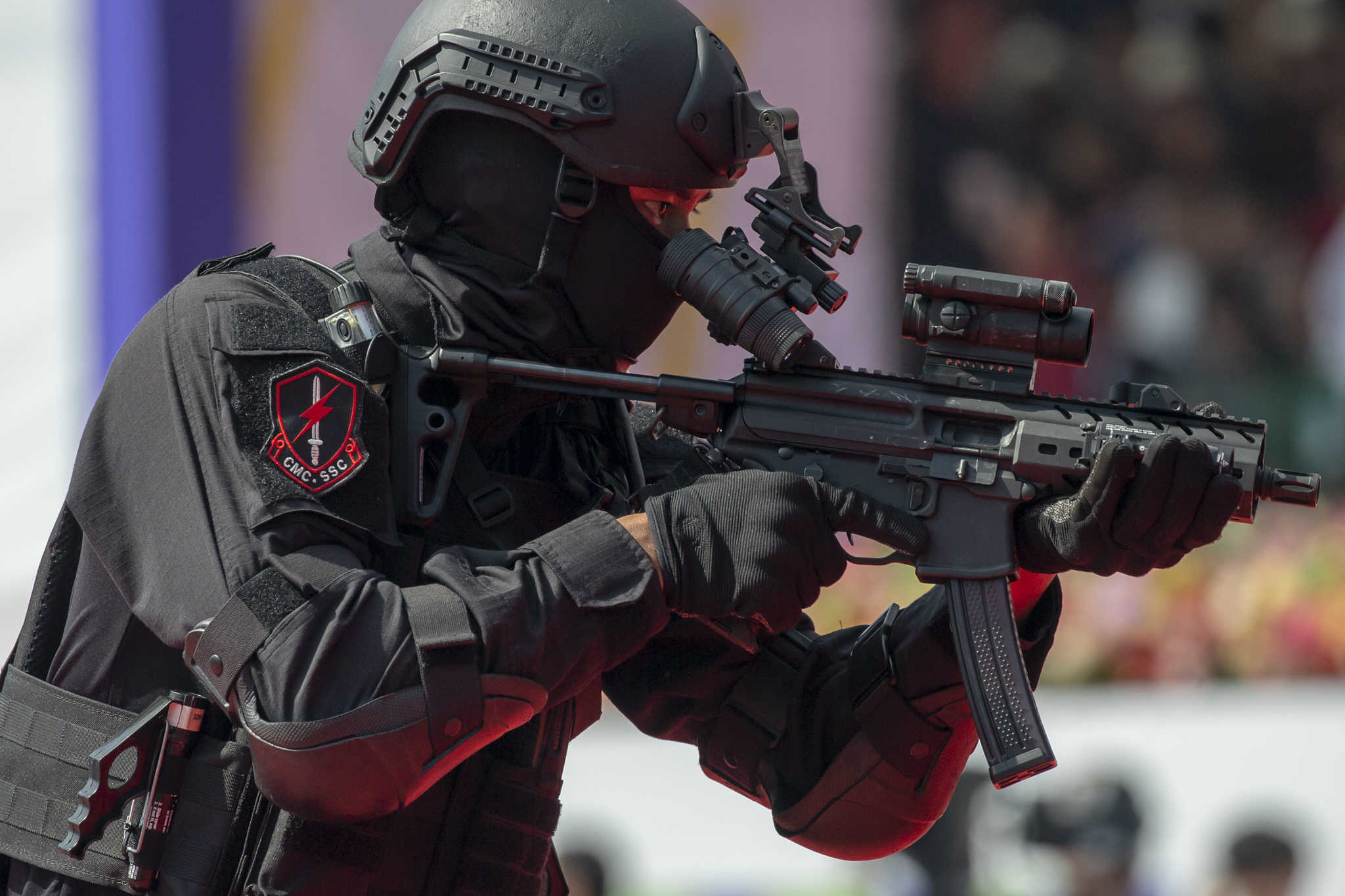 10.10 總統出席「中華民國中樞暨各界慶祝108年國慶大會」